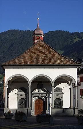 Bundeskapelle (1632-35) in Brunnen (Nr. 03.1-8730)